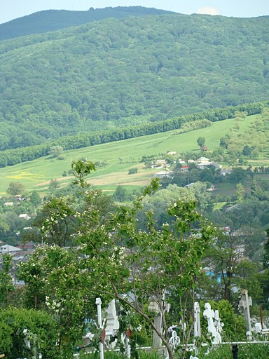 vedere de ansamablu